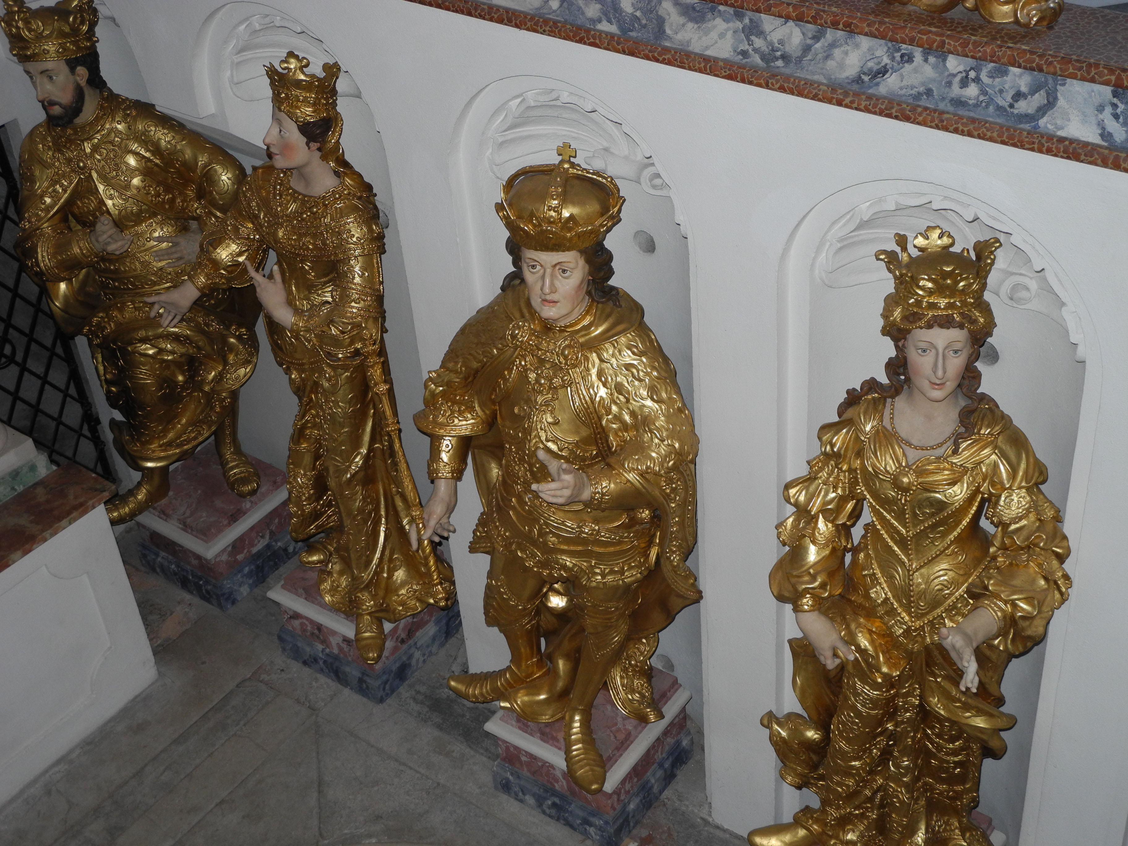 Gesamtanlage, Zisterzienserstift Stams und Reste von Vorgängerbauten